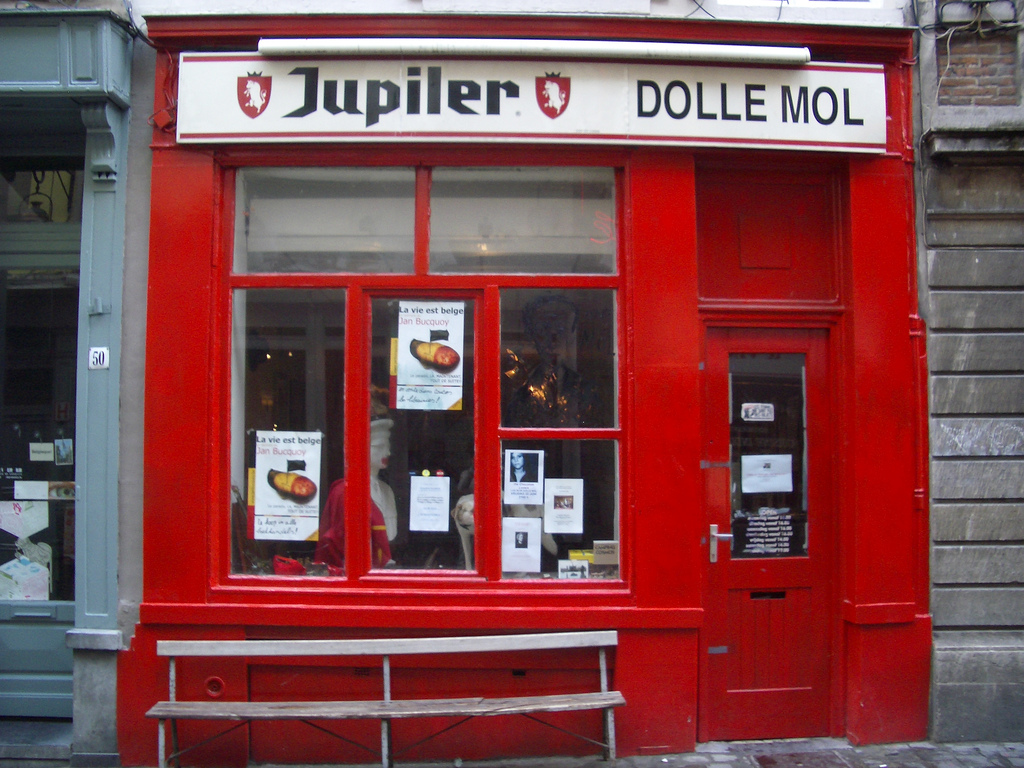 Le "Dolle Mol" (La taupe aveugle en français) - café situé rue des Éperonniers au centre de Bruxelles.